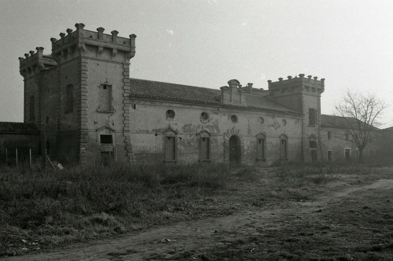 Servizio fotografico : Portomaggiore, 1974 / Paolo Monti. - Strisce: 1, Fotogrammi complessivi: 4 : Negativo b/n, gelatina bromuro d'argento/ pellicola ; 35 mm. - ((Sul portanegativi: N[I]K[MA]T FP4. - All'interno del portanegativi: la serie è anche identificata da una linea verticale a pennarello nero che separa la suddetta serie dalla successiva di soggetto diverso. - Occasione: Documentazione del territorio della provincia di Ferrara e dei centri storici minori. - Fonte: Agenda di Paolo Monti: Leica 1501-3000 Controllo numerazione (1950-1978), presso Archivio Paolo Monti. - Fonte: Fattura di Paolo Monti: IV. Commesse/ Fattura n. 11 (1975/04/29), presso Archivio Paolo Monti. - Fonte: Monografia: Territorio ferrarese: un programma di governo della Regione e delle autonomie locali, catalogo della mostra, Ferrara 1975, a cura di Roberto FREGNA, Modena, Soc. Immobiliare & Poligrafica emiliana (1975)